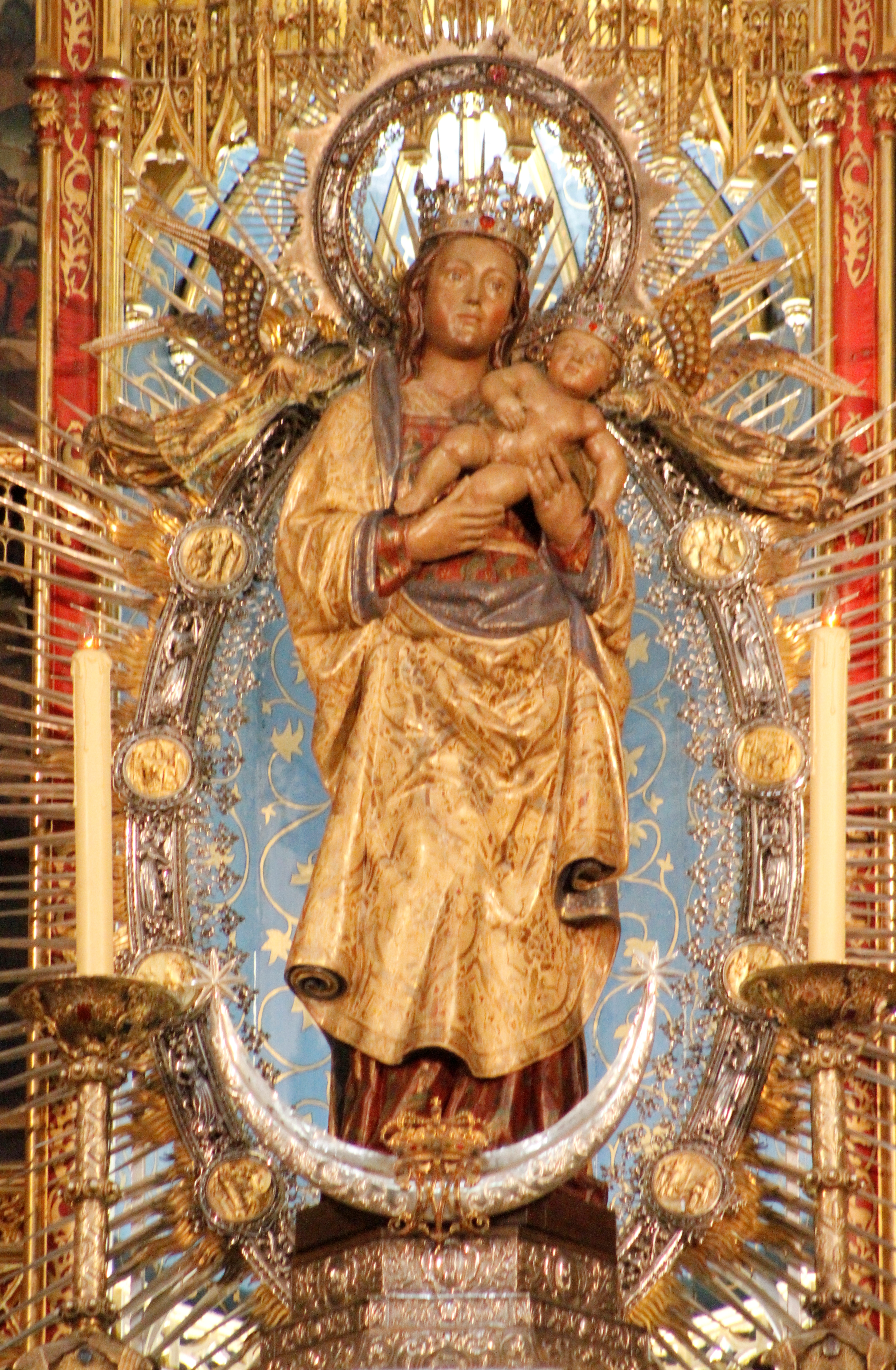 Interior da Catedral